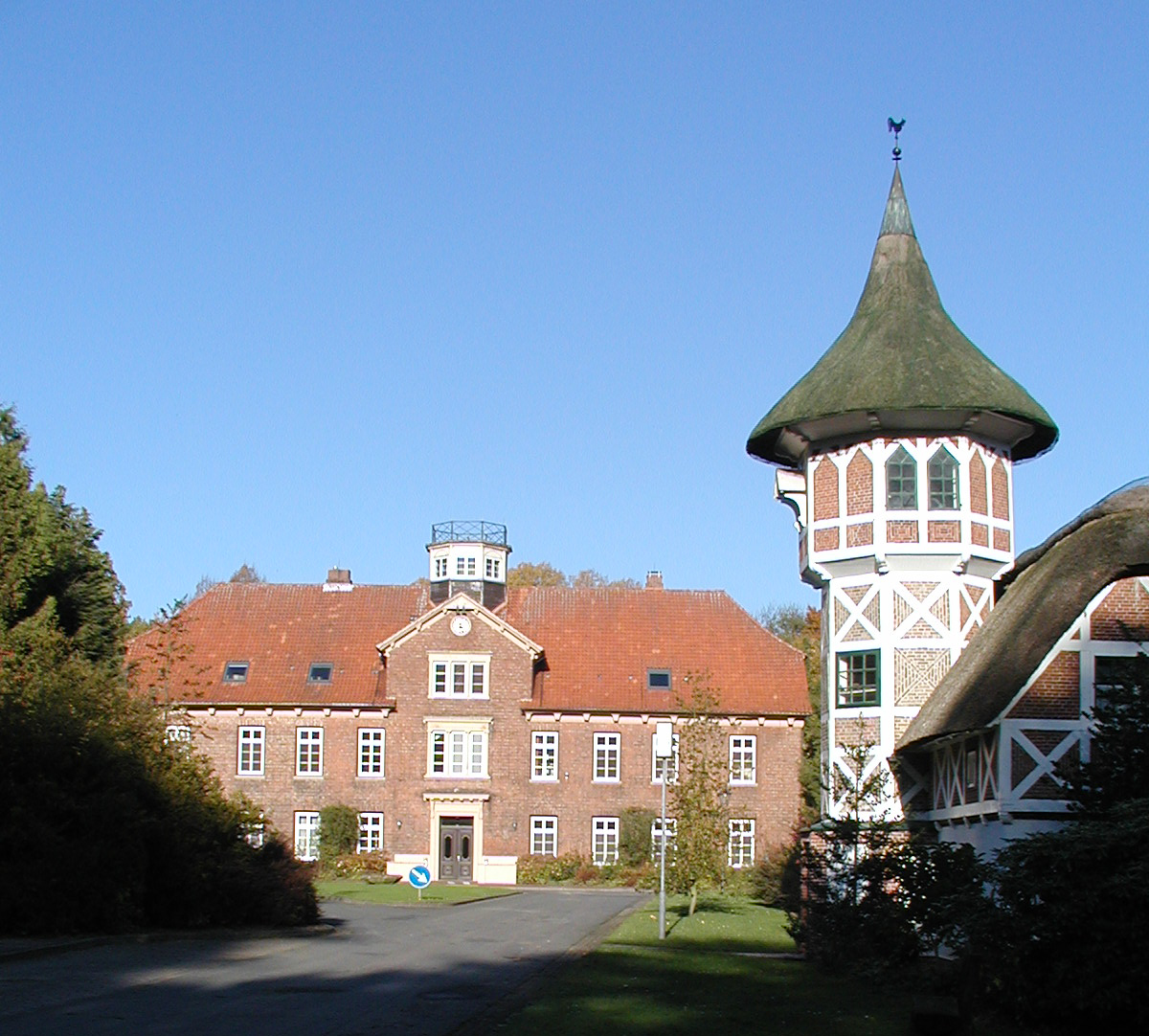 Das Internat